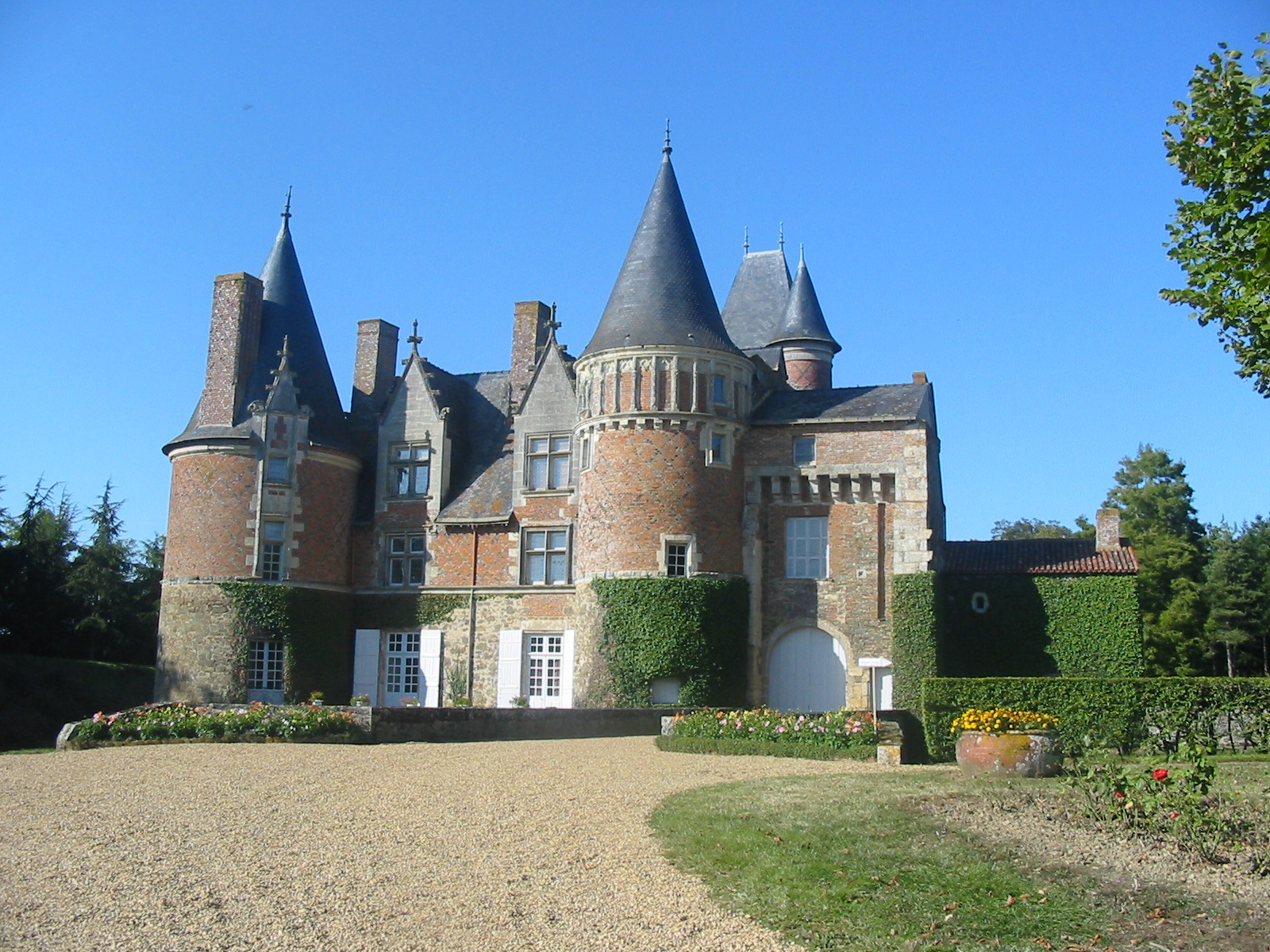 Château du Coudray-Montbault à Vihiers (Maine-et-Loire, France).